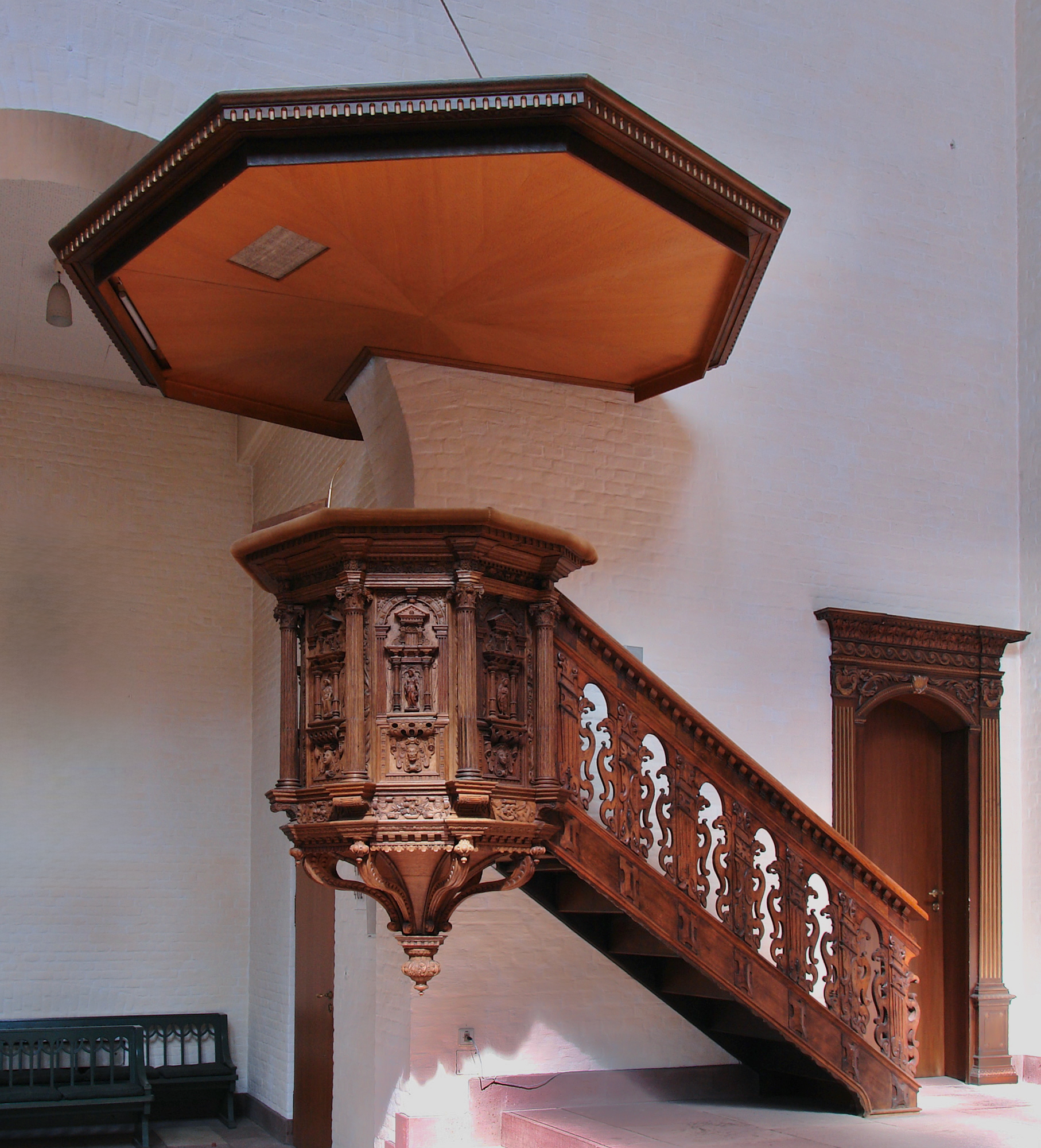 St.Ansgarii-Kirche in Bremen. Kanzel von 1592 aus der alten Stadtkirche St. Ansgarii (Werk wird dem Snitker Hermen Wulff zugeschrieben).